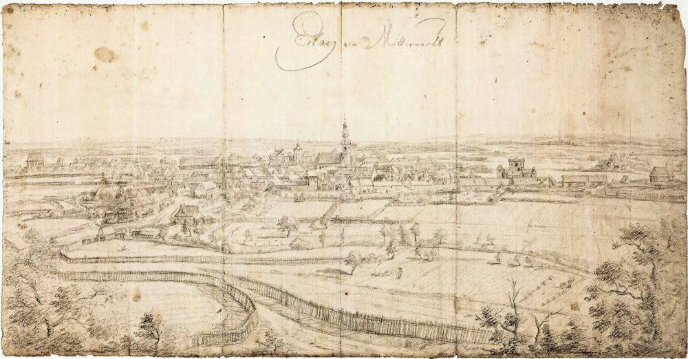 Erlang von Mitternacht. Bleistiftzeichnung (um 1732).